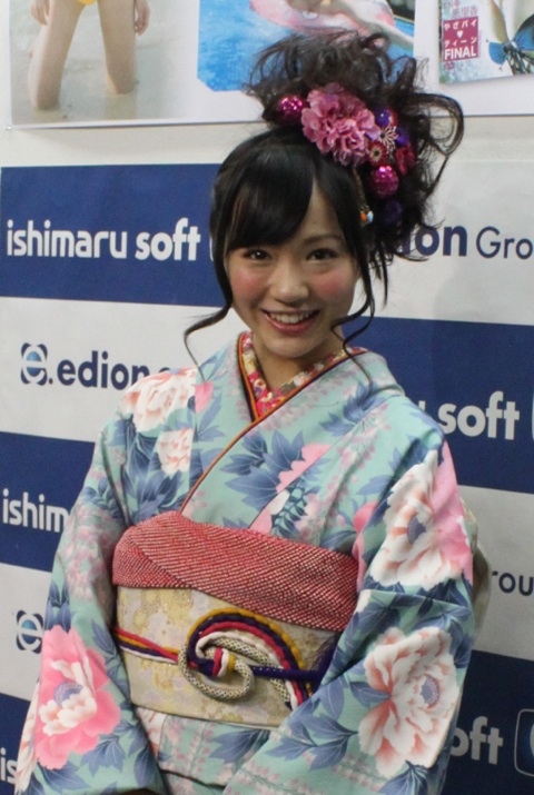 Erika Yazawa at her DVD release event in Tokyo